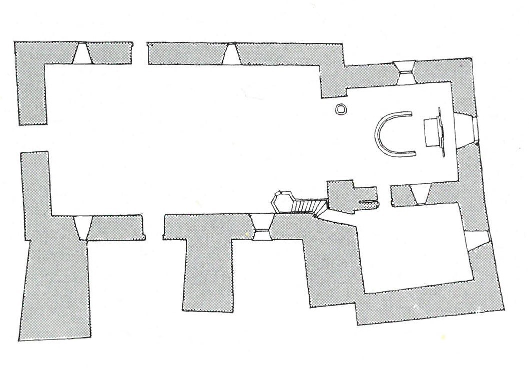 Grunnplan i Sakshaug gamle kirke, Inderøy, Nord-Trøndelag, Norway